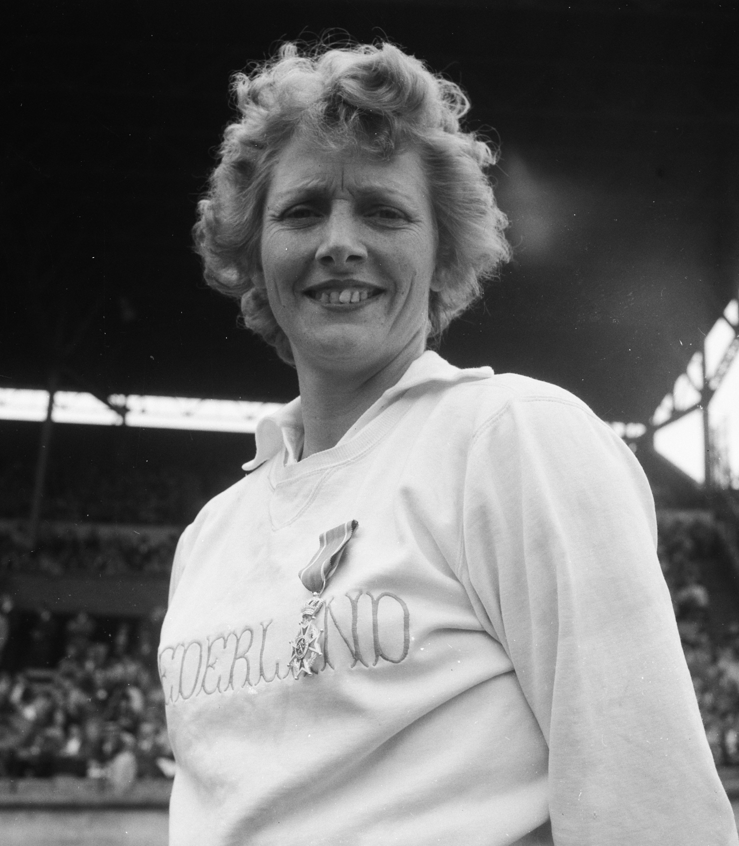 Collectie / Archief : Fotocollectie Anefo Reportage / Serie : [ onbekend ] Beschrijving : Olympische dag in Amsterdam. Fanny Blankers-Koen Datum : 26 juni 1949 Locatie : Amsterdam, Noord-Holland Trefwoorden : atleten, atletiek, portretten, sport Persoonsnaam : Blankers-Koen, Fanny Fotograaf : Noske, J.D. / Anefo Auteursrechthebbende : Nationaal Archief Materiaalsoort : Negatief (zwart/wit) Nummer archiefinventaris : bekijk toegang 2.24.01.03 Bestanddeelnummer : 903-4520